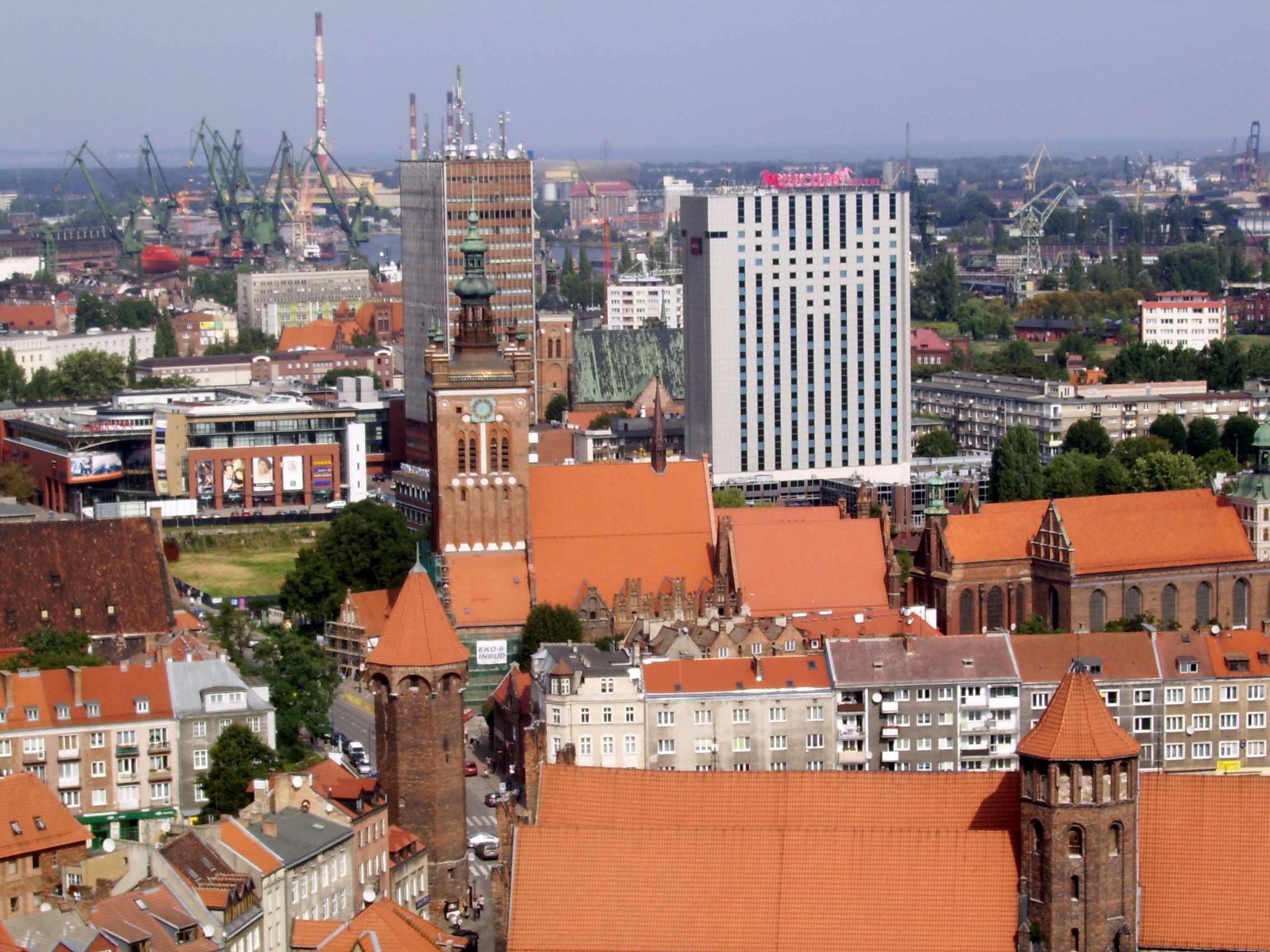 Gdańsk, Stare Miasto Wikidata has entry Q1165324 with data related to this item.